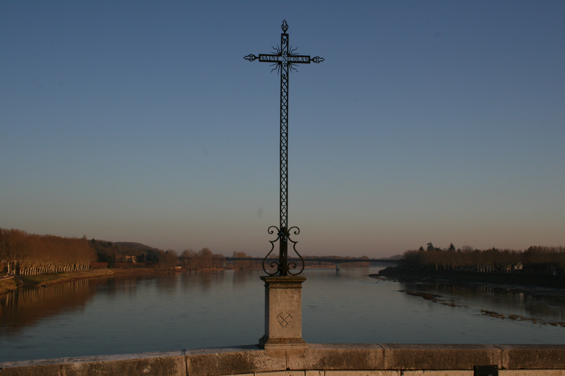 Vieux pont de Gien (Loiret - France)